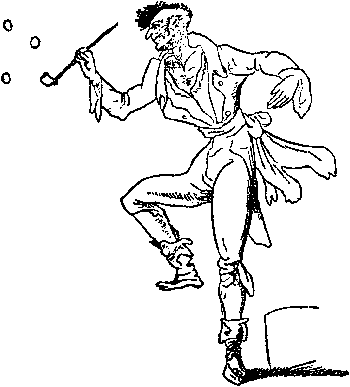 Der Kapellmeister Johannes Kreisler, gezeichnet von Ernst Theodor Amadeus Hoffmann